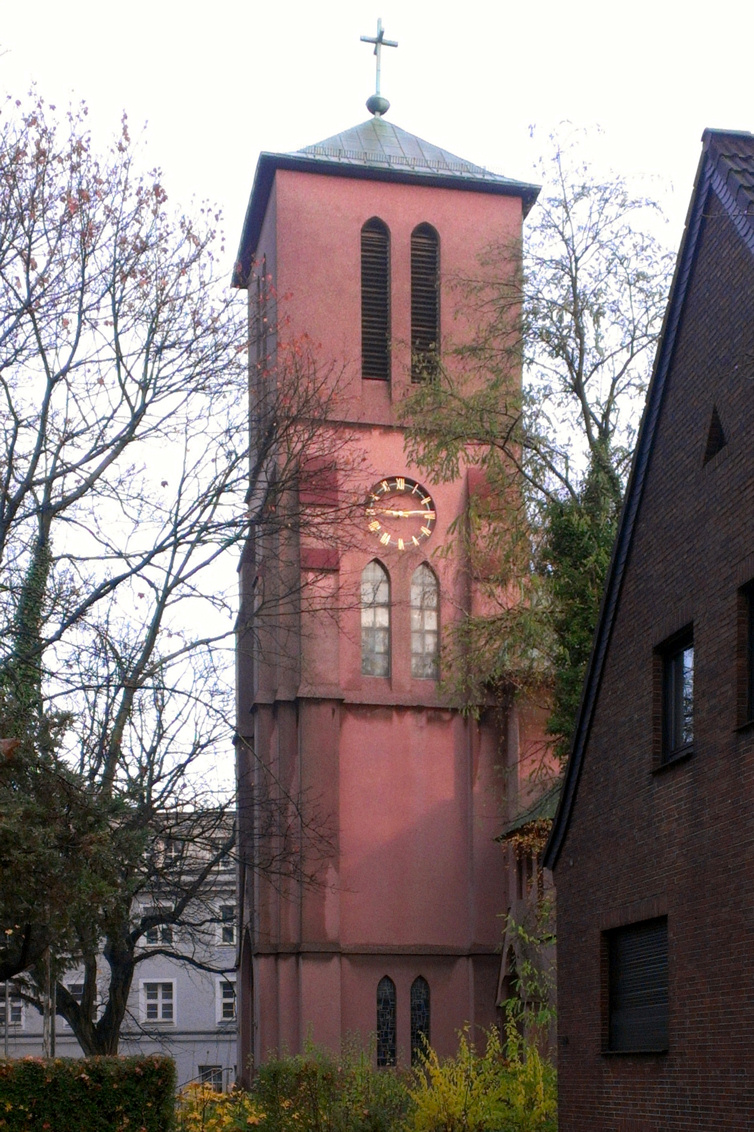 Lutherkirche in Essen-Frohnhausen